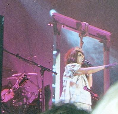 Emiliàn e rumagnòl: Alice Cooper al punta al dî prima 'd èsar impicâ a Milàṅ, Nuvémbar 2010